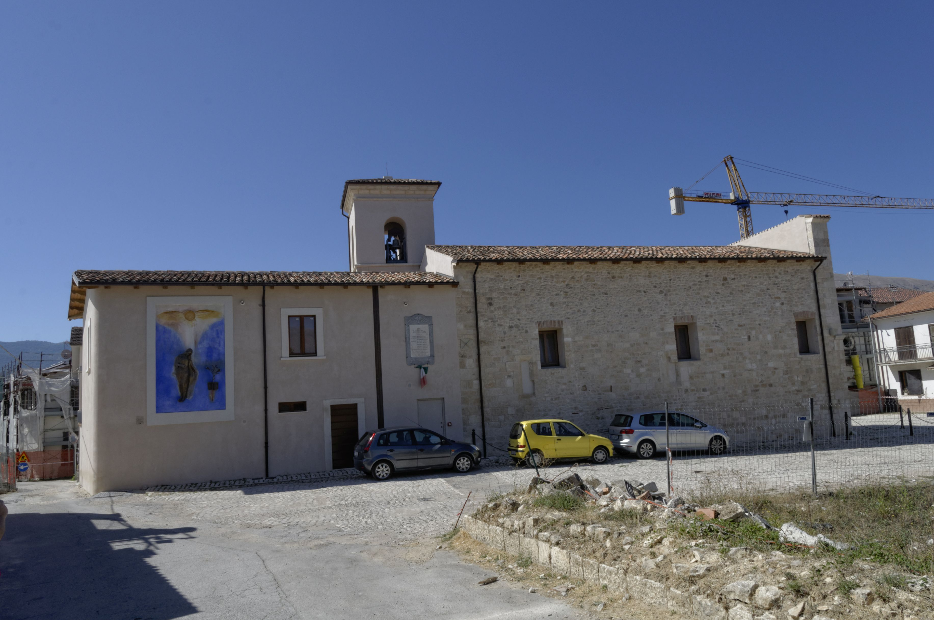 Onna (L’Aquila) 2017 Dieses Foto entstand in Zusammenarbeit mit Stadtbesichtigungen.de Die Seiten Stadtbesichtigungen.de, der dazugehörige Reise Blog sowie die Facebookseite: Stadtbesichtigungen Rom dürfen dieses Bild für Ihre Veröffentlichungen ohne den Hinweis auf Wikipedia, Commons bzw der Lizenz verwenden. Die Verantwortlichen habe von mir (Ra Boe) die Originaldaten zur freien Verfügung übermittelt bekommen.